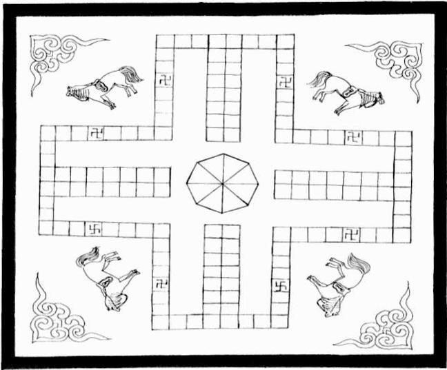 中文（台灣）: 蒙古的帕爾杰